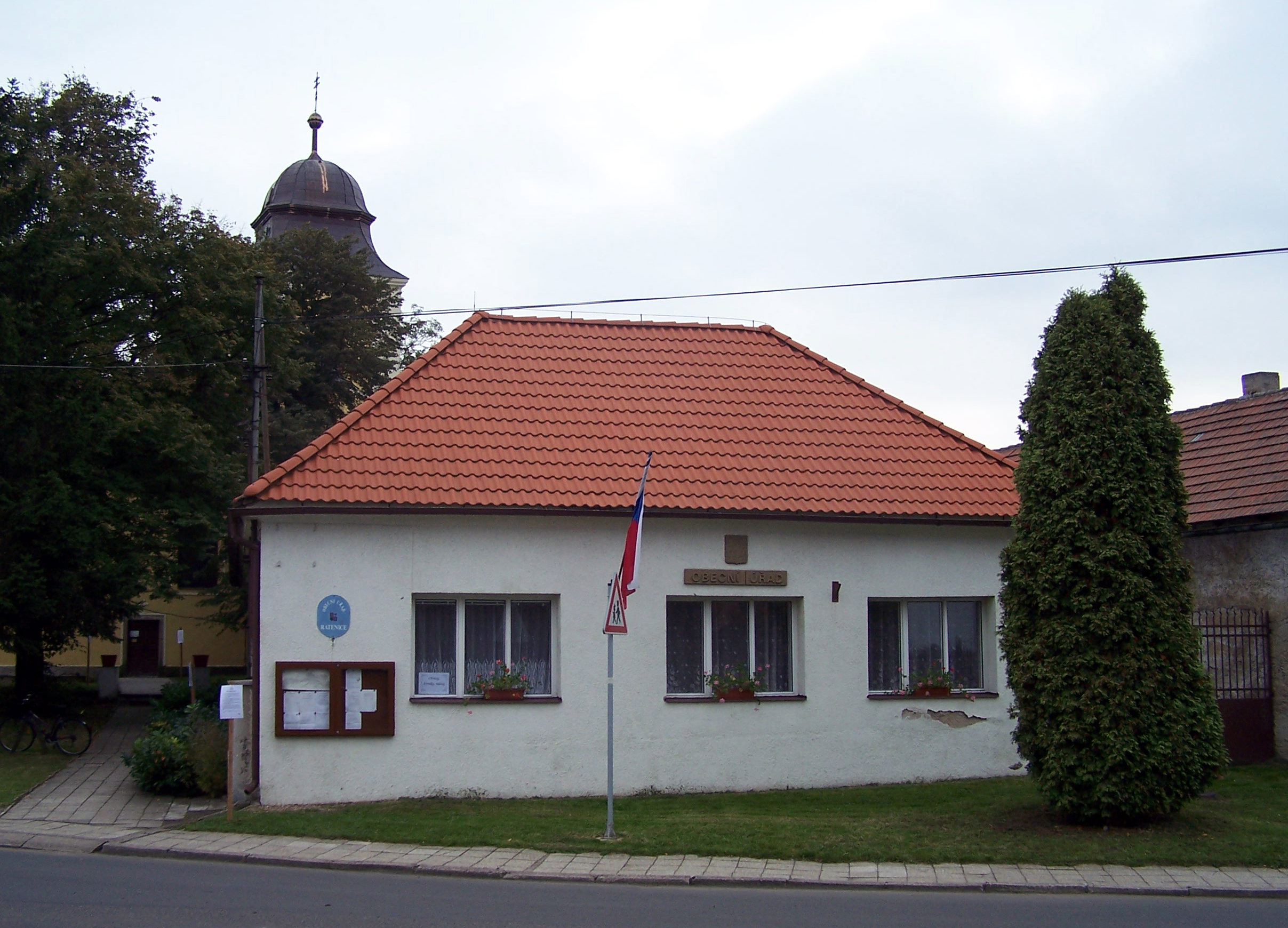 Obecní úřad v Ratenicích